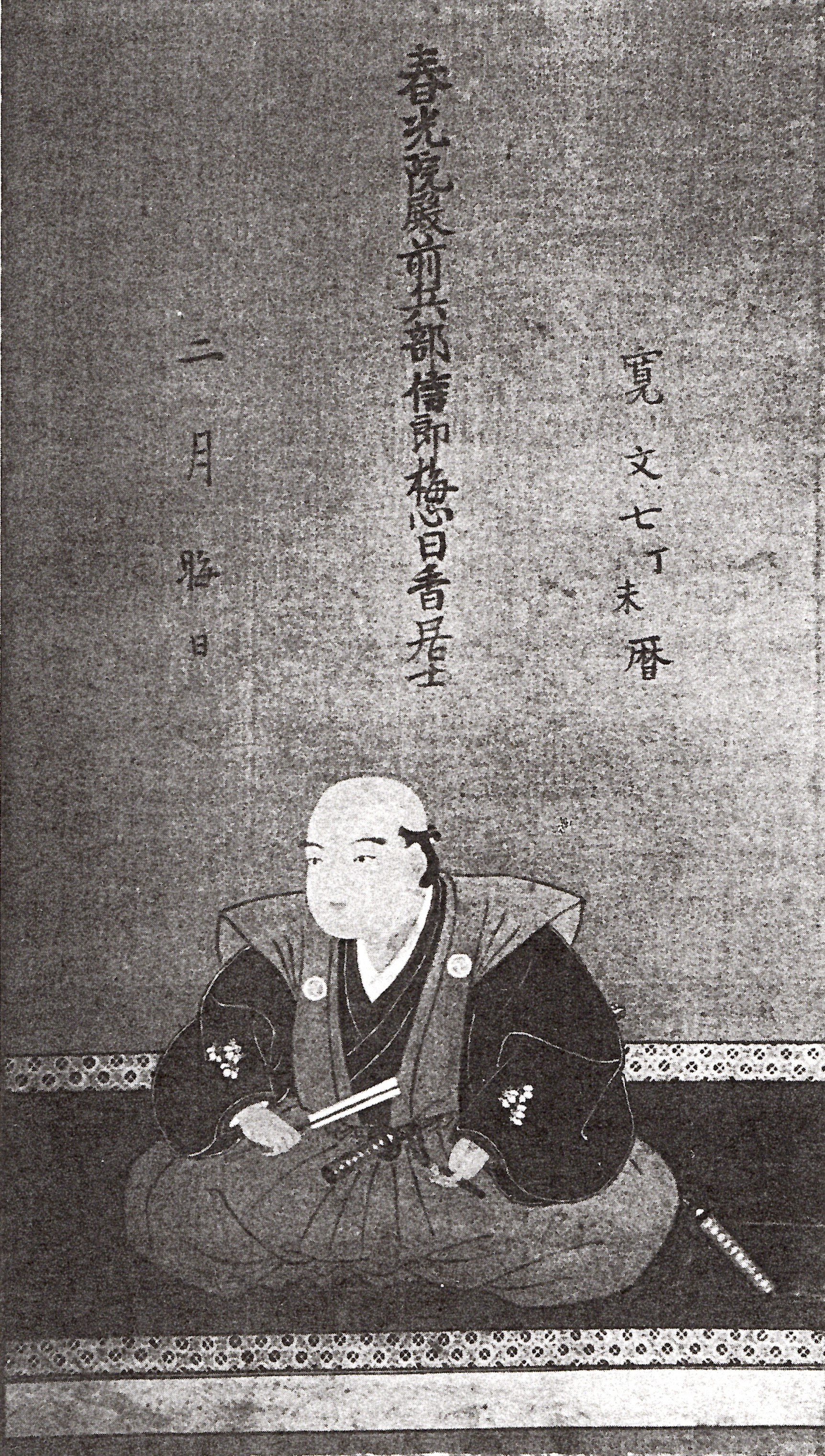 信濃上田藩2代藩主・仙石政俊の嫡男・仙石忠俊の肖像画。